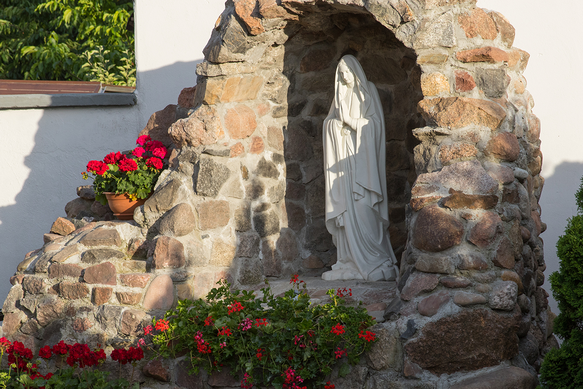 Grota Matki Bożej przy kościele na bydgoskich Jachcicach